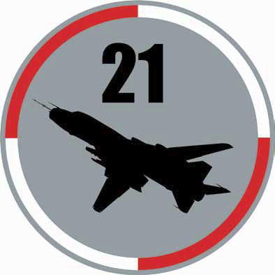 Odznaka rozpoznawcza 21 Bazy Lotnictwa Taktycznego na mundur wyjściowy. Decyzja Nr 407/MON Ministra Obrony Narodowej z dnia 3 listopada 2011 r.